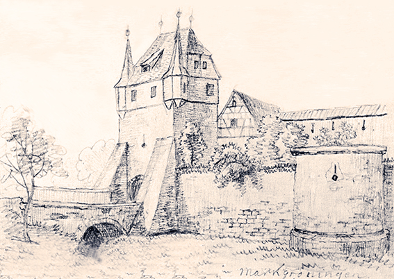 Esslinger Tor in Markgröningen mit Halbrondell an der Zwingermauer – erbaut im 13. Jhdt., abgerissen nach 1831